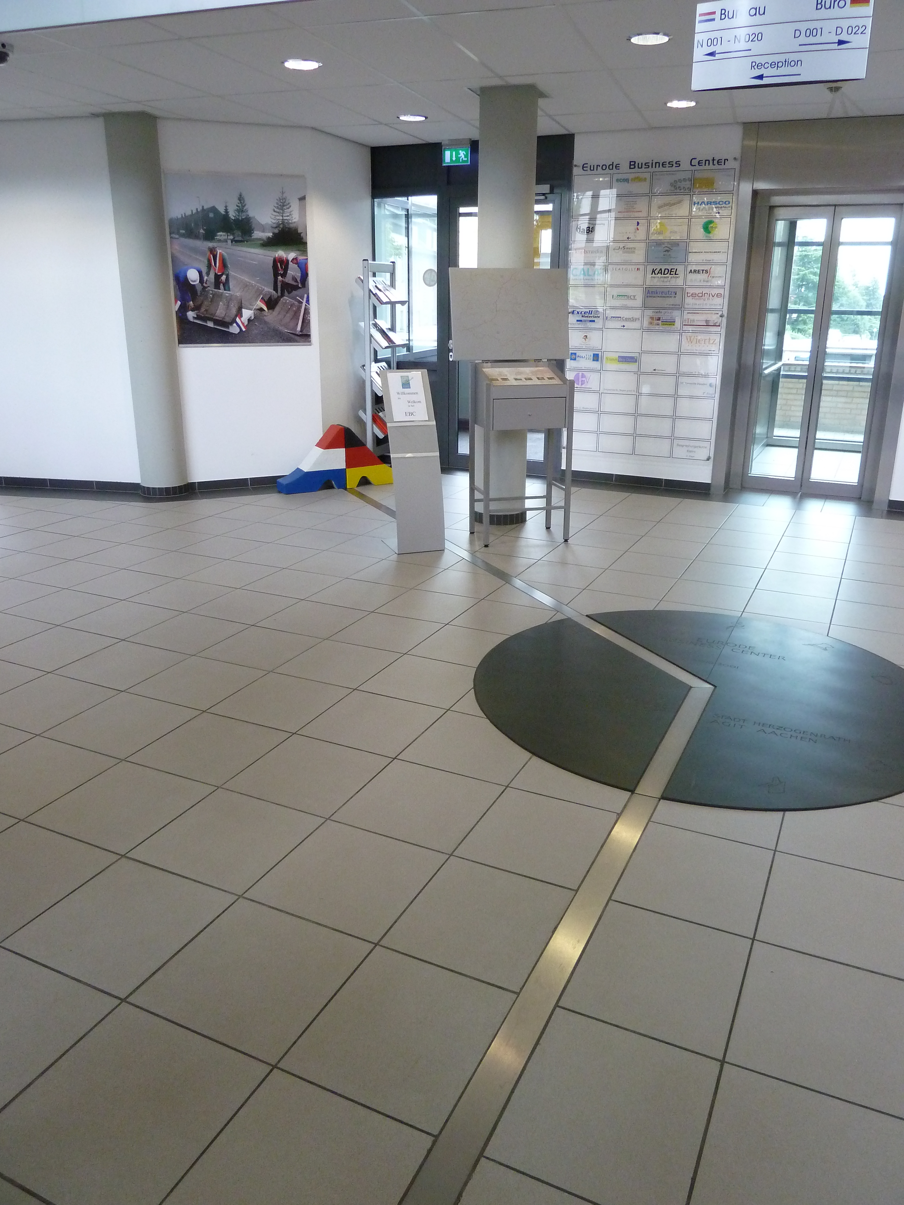 Niederländisch-Deutsche Grenze im Eurode Businesscenter. Im Hintergrund ein Bild der Abrissarbeiten der Mauer